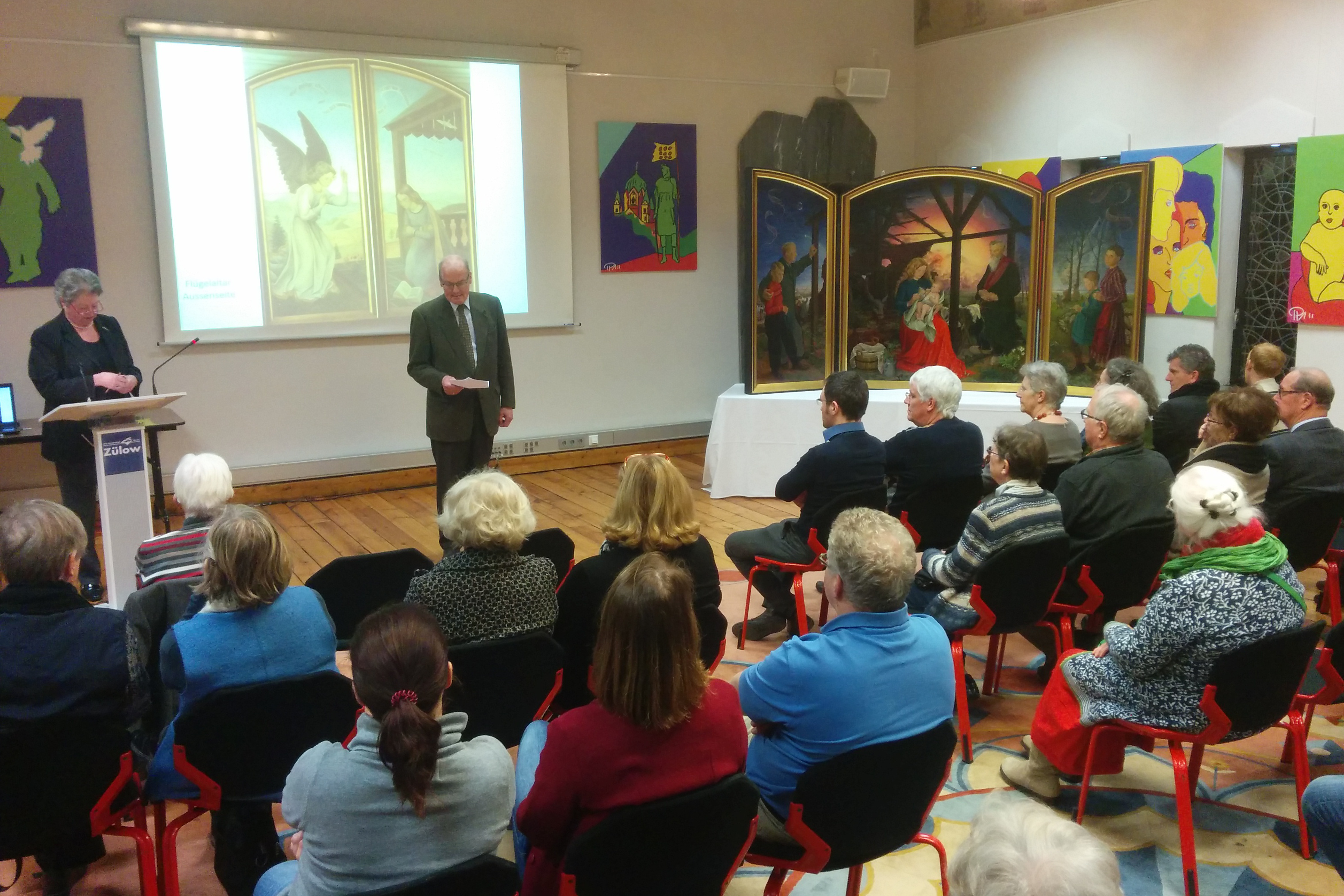 Das Bild entstand zum Vortrag über den Triptychon von Liselotte Schramm-Heckmann auf Gut Gnadental. Es zeigt die Begrüßung durch Dirk Kranefuss (mitte) vor dem Vortrag von Frau Dr. Gisela Götte (links), der ehem. Leiterin des Clemens-Sels-Museums in Neuss.